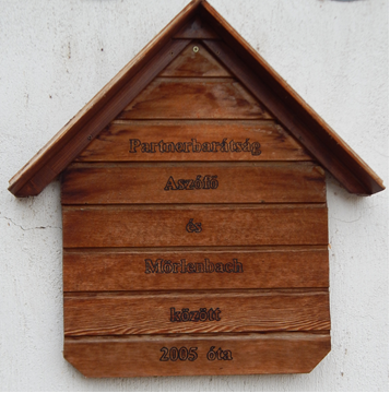 Mörlenbach